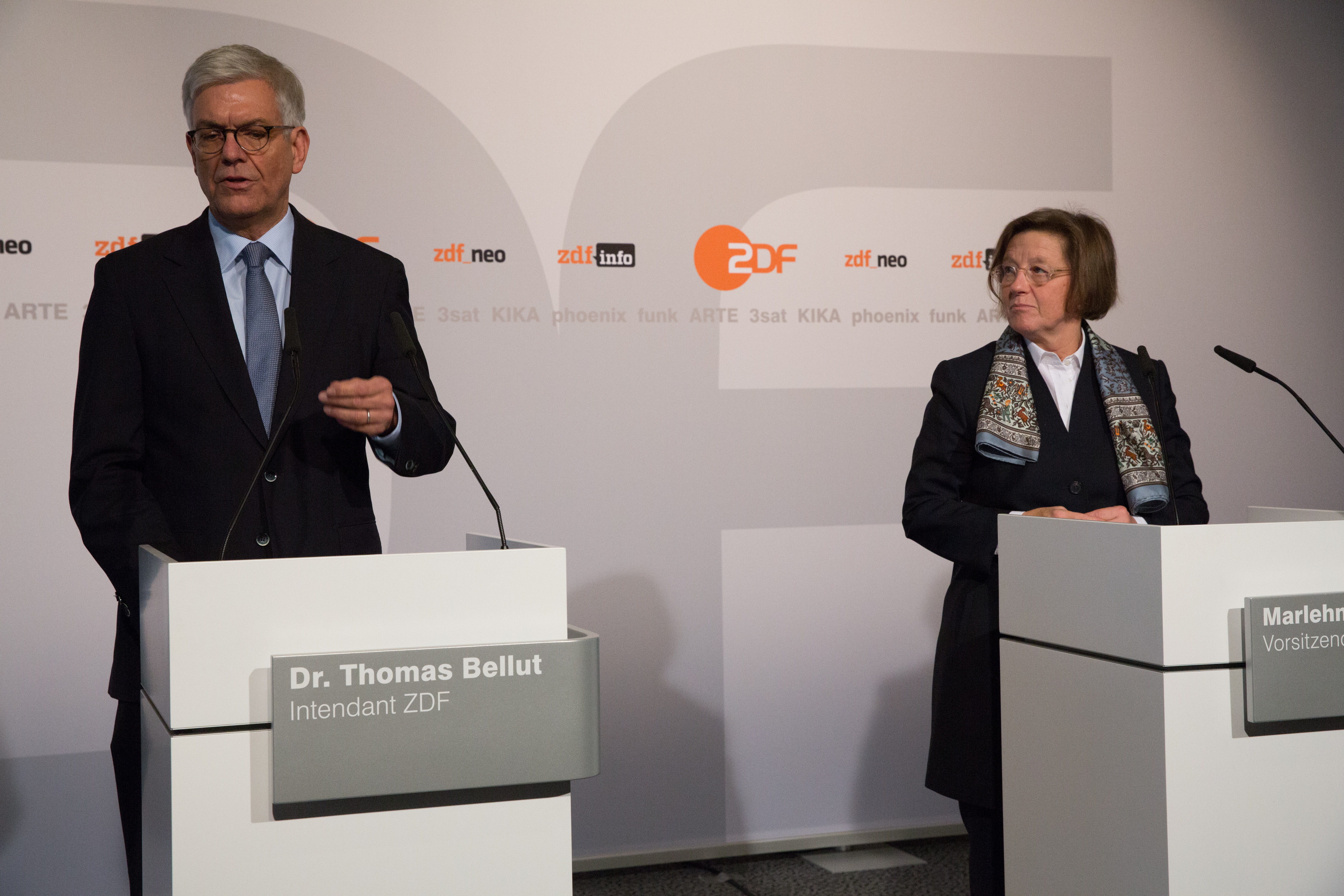 Marlehn Thieme und Thomas Bellut, Pressekonferenz nach einer Sitzung des ZDF Fernsehrates